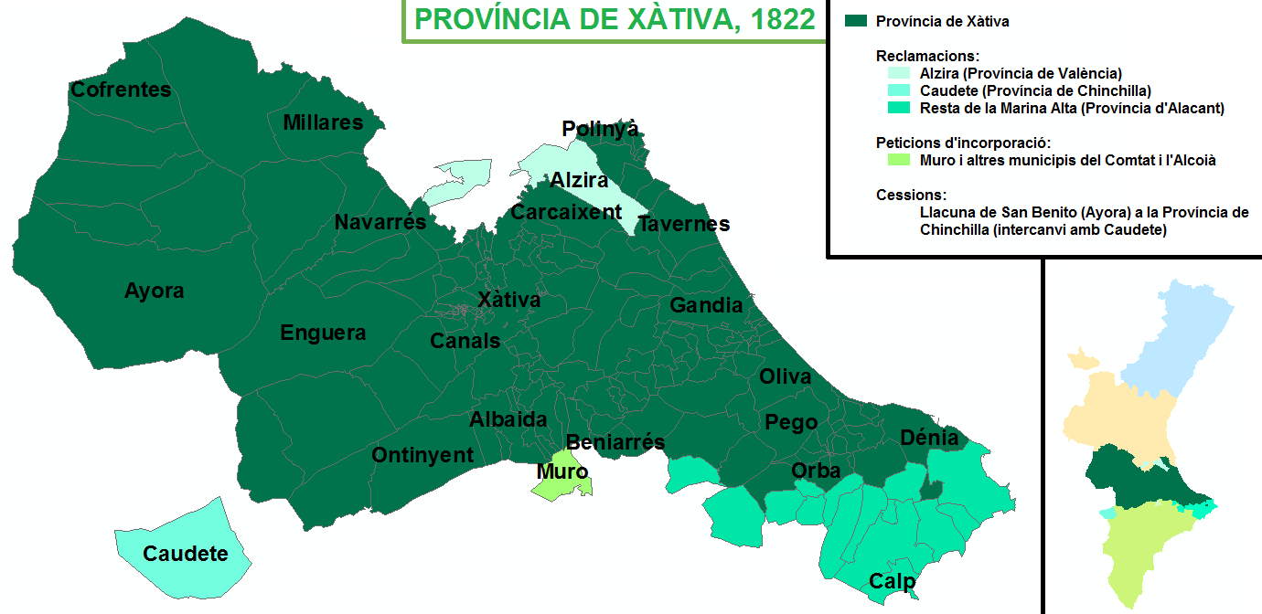 Provincia de Xàtiva de 1822